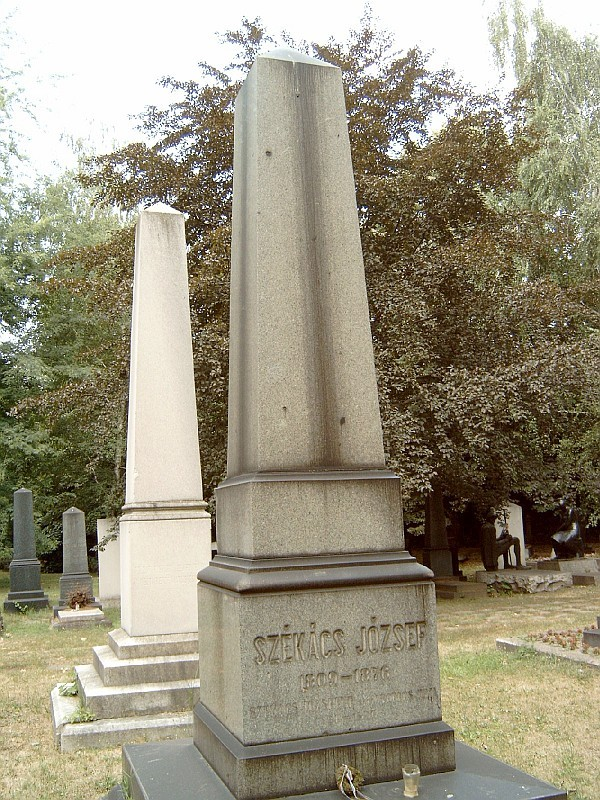 Székács József (Orosháza, 1809. febr. 2. – Bp., 1876. júl. 29.): költő, műfordító, egyházi író, ev. püspök sírja Budapesten. Kerepesi temető: 34/1-2-18.